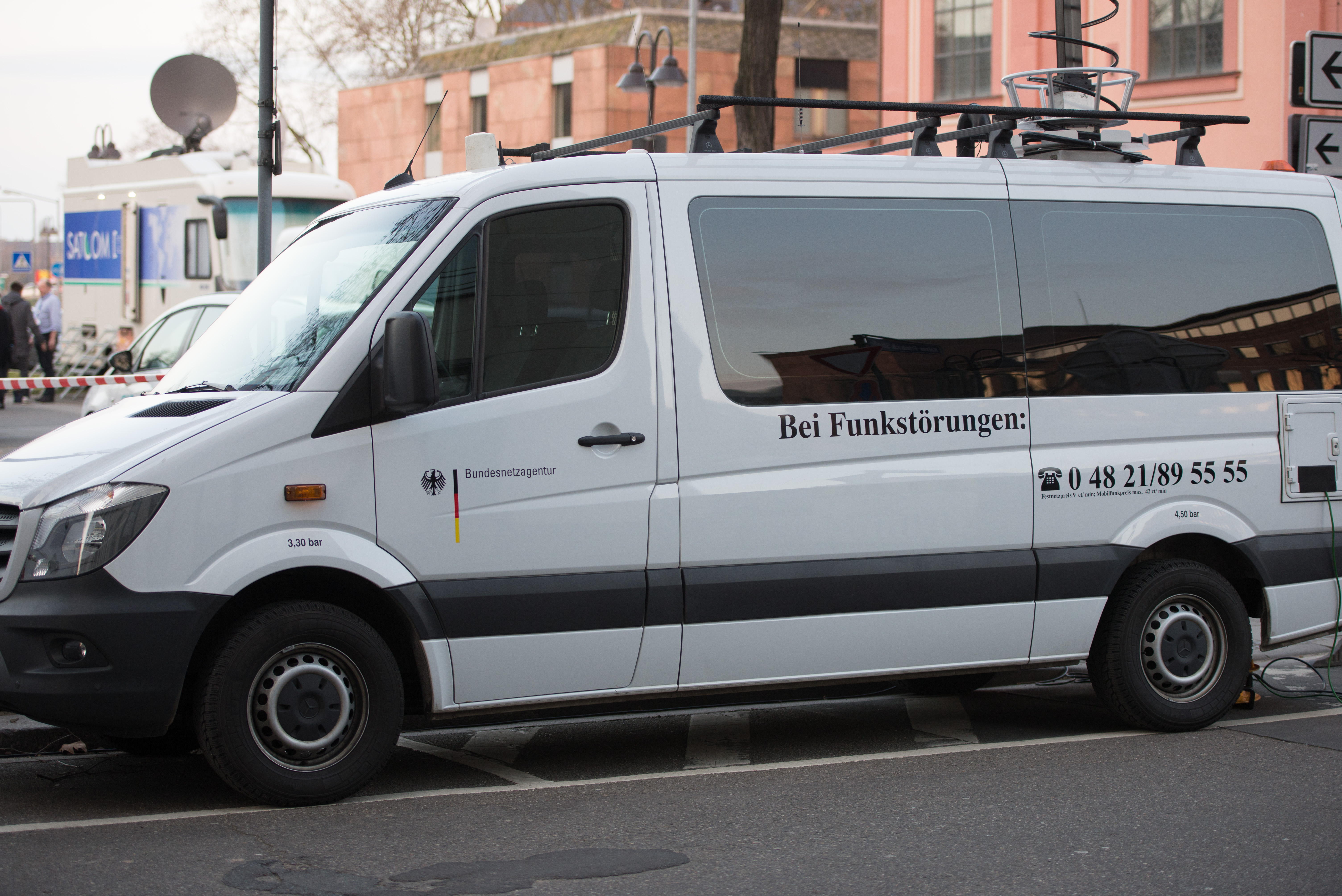 Impressionen am Abend der Landtagswahl in Rheinland-Pfalz am 13. März 2016